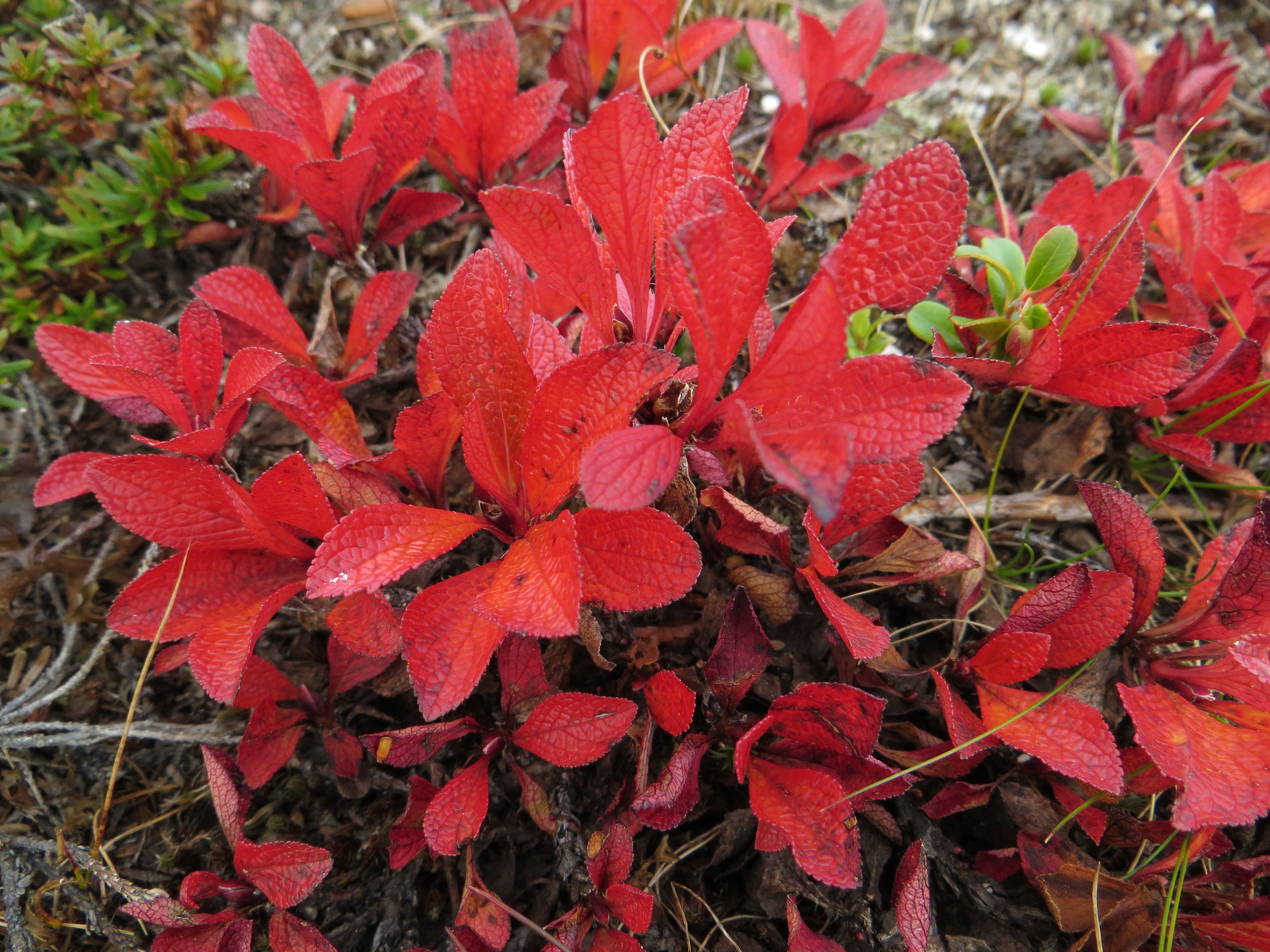 Pflanze in Lappland Herbst